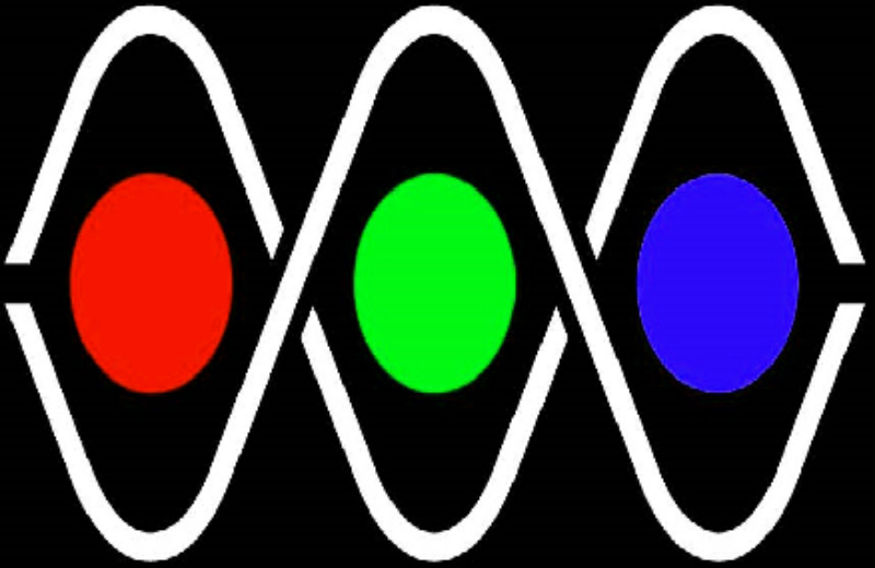 Tercer logo